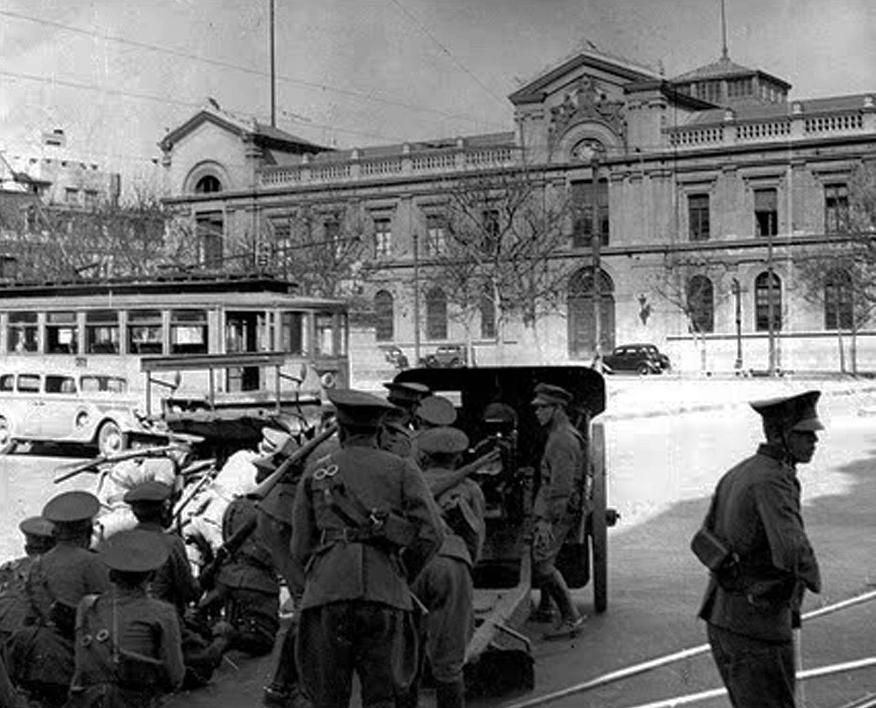 Durante la toma de la casa central de la Universidad de Chile por un grupo del nacistas, las tropas del regimiento Tacna atacan con cañones las puertas del edificio, para poner fin a la ocupación. Los jóvenes capturados fueron llevados al edificio del Seguro Obrero, donde fueron asesinados por carabineros en la llamada "matanza del Seguro Obrero".